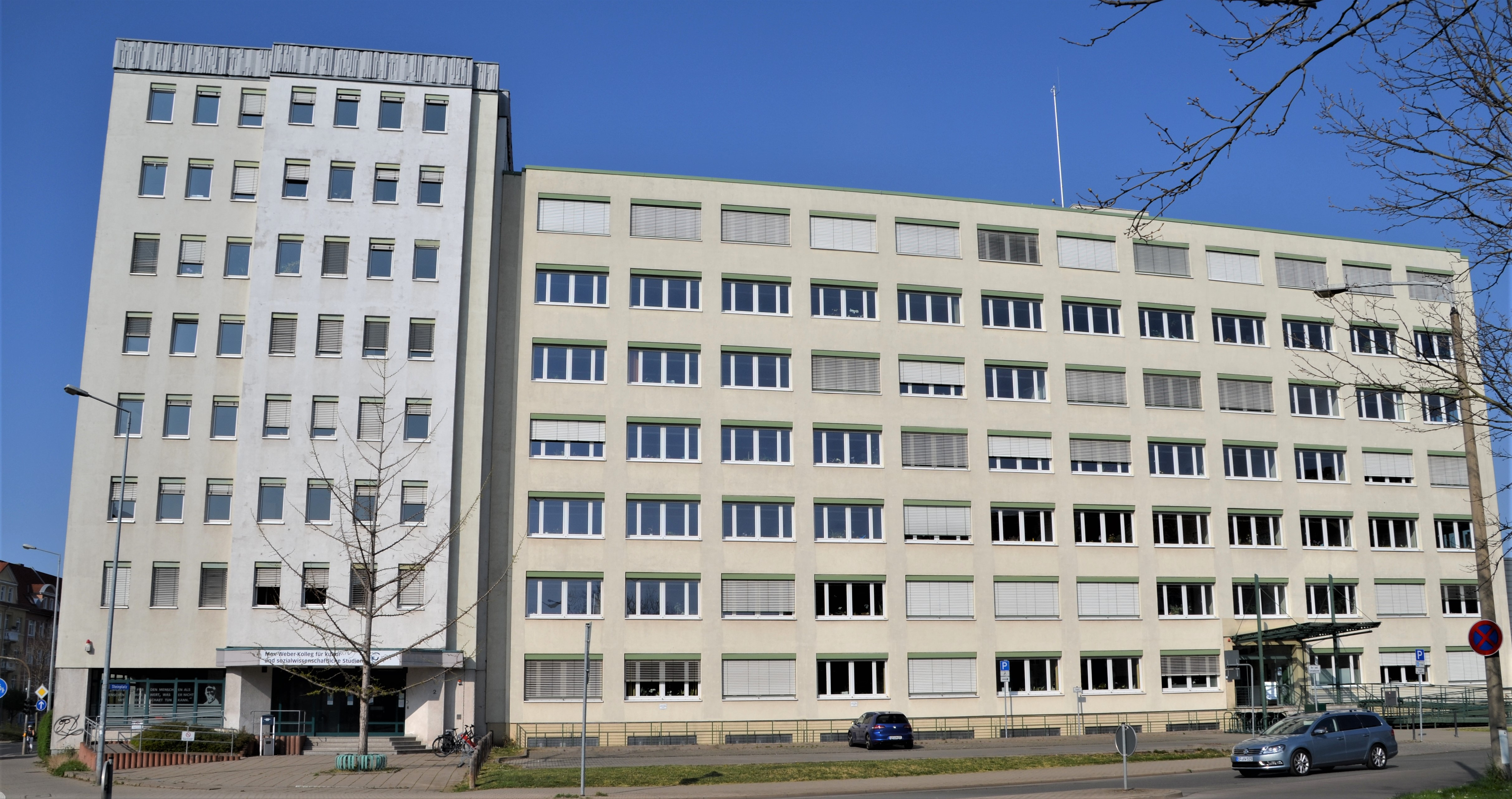 Steinplatz 2, früher FH Erfurt, jetzt Max-Weber-Kolleg